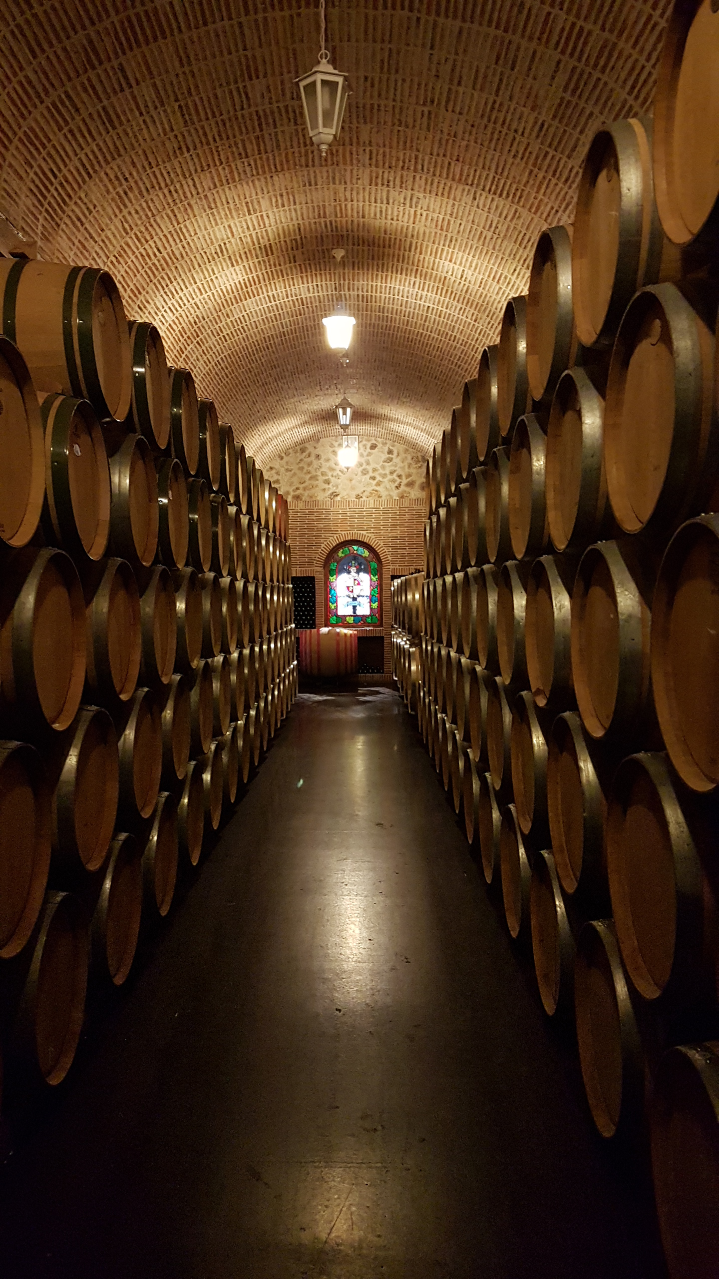 Barricas de vino apiladas en las Bodegas Casajús, en la Denominación de Origen, Ribera del Duero. En la localidad de Quintana del Pidio (Burgos) España.